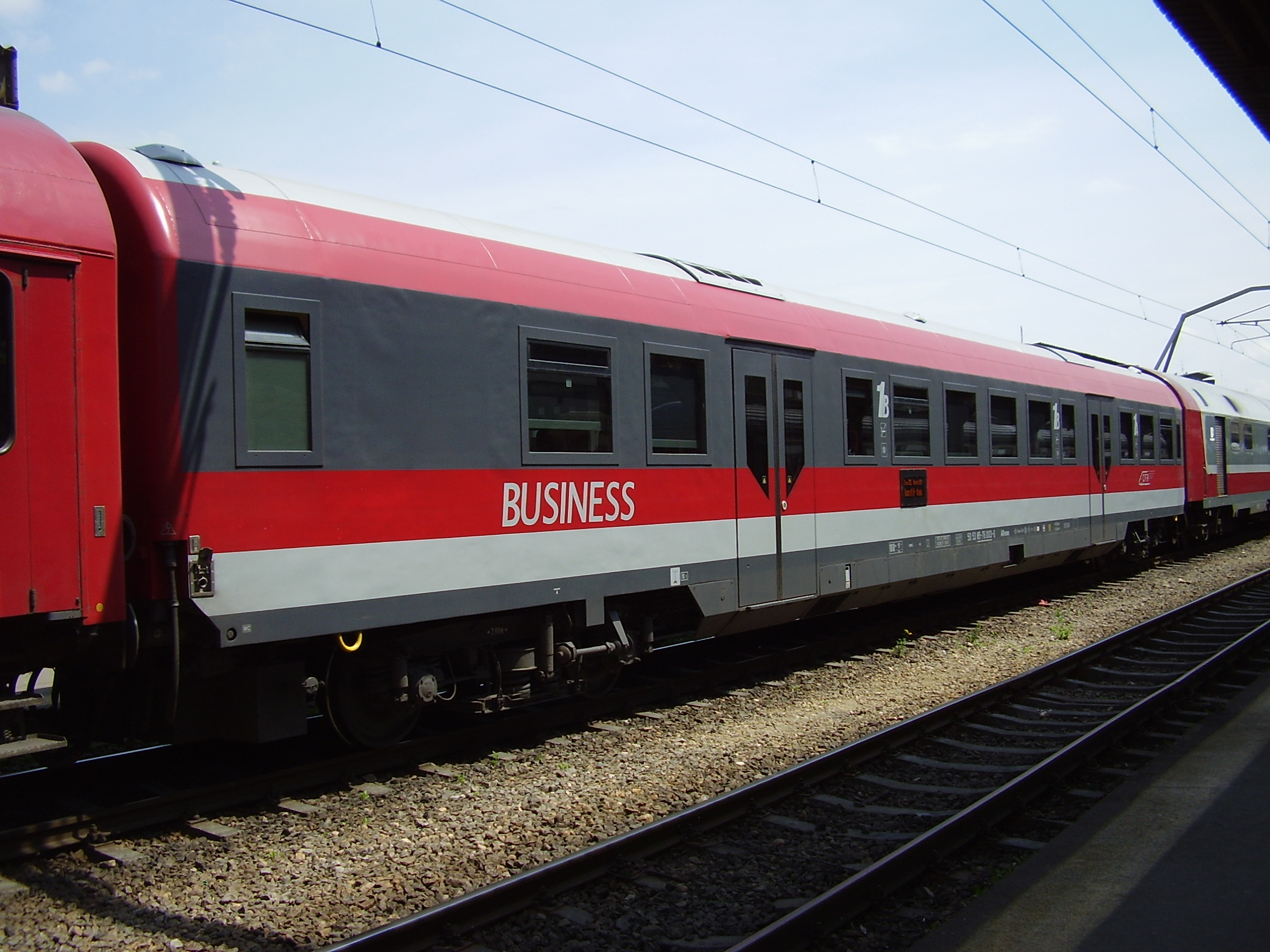 Vagon clasa Business.